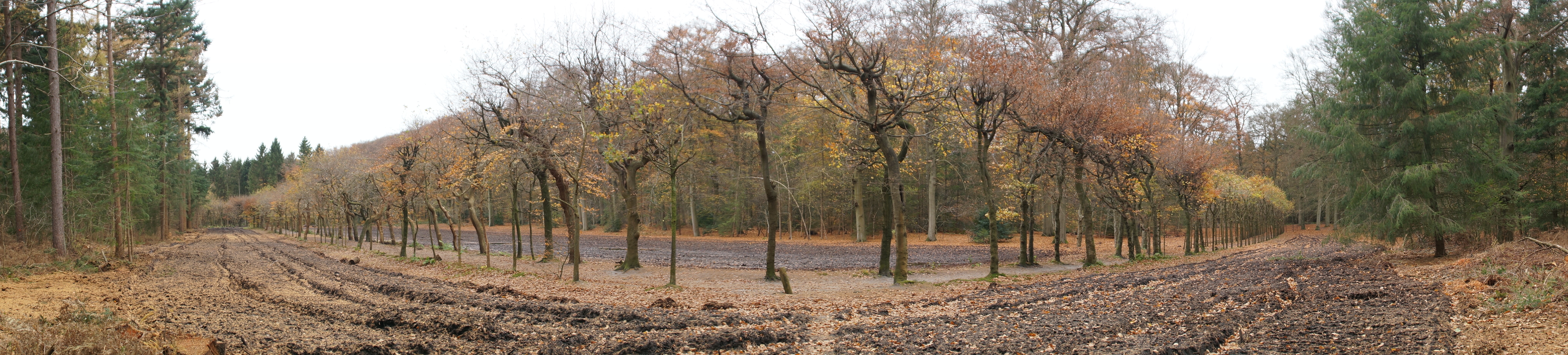 9 november 2015, herstel Berceau